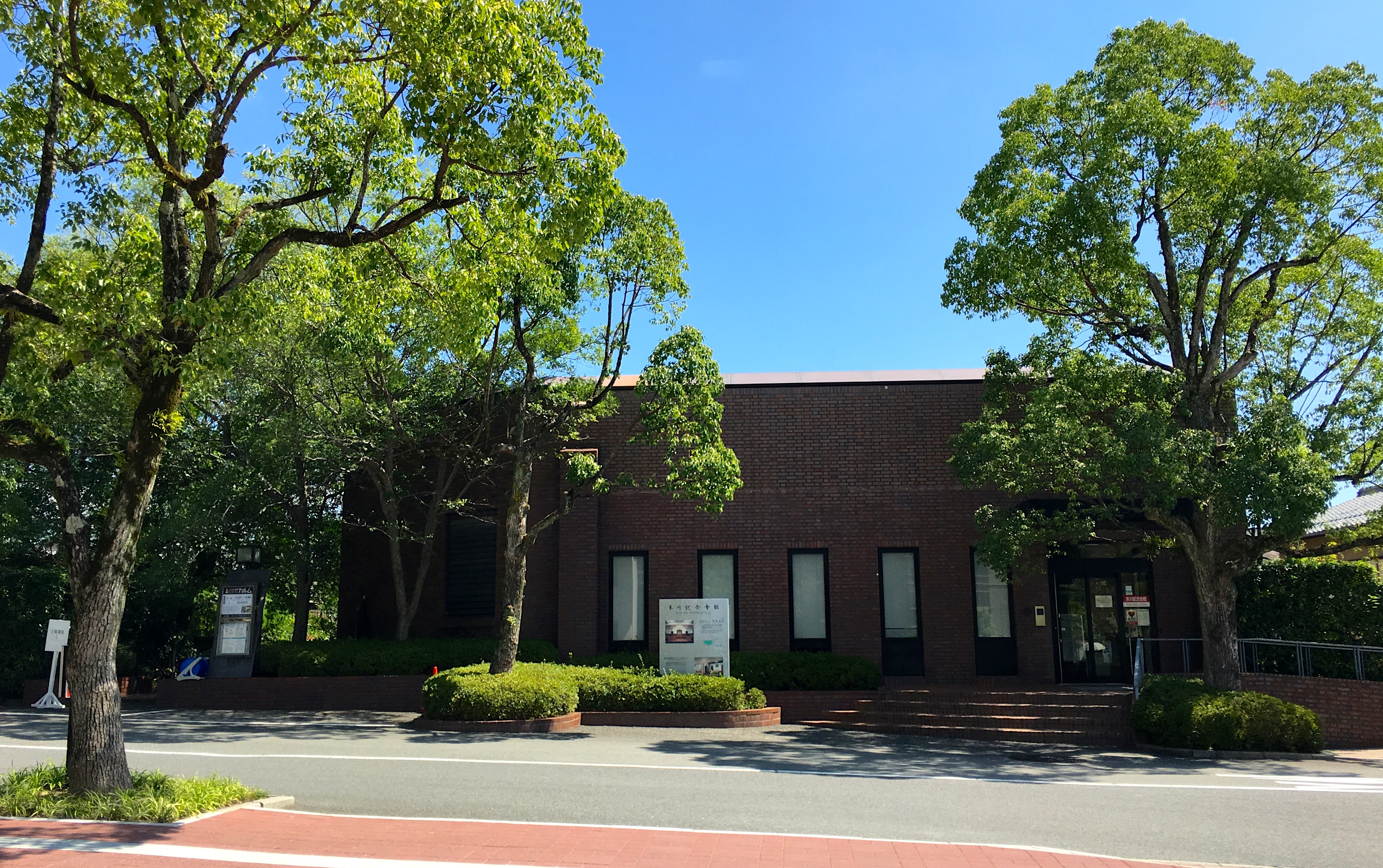 The photo was taken by me on September 10, 2016.